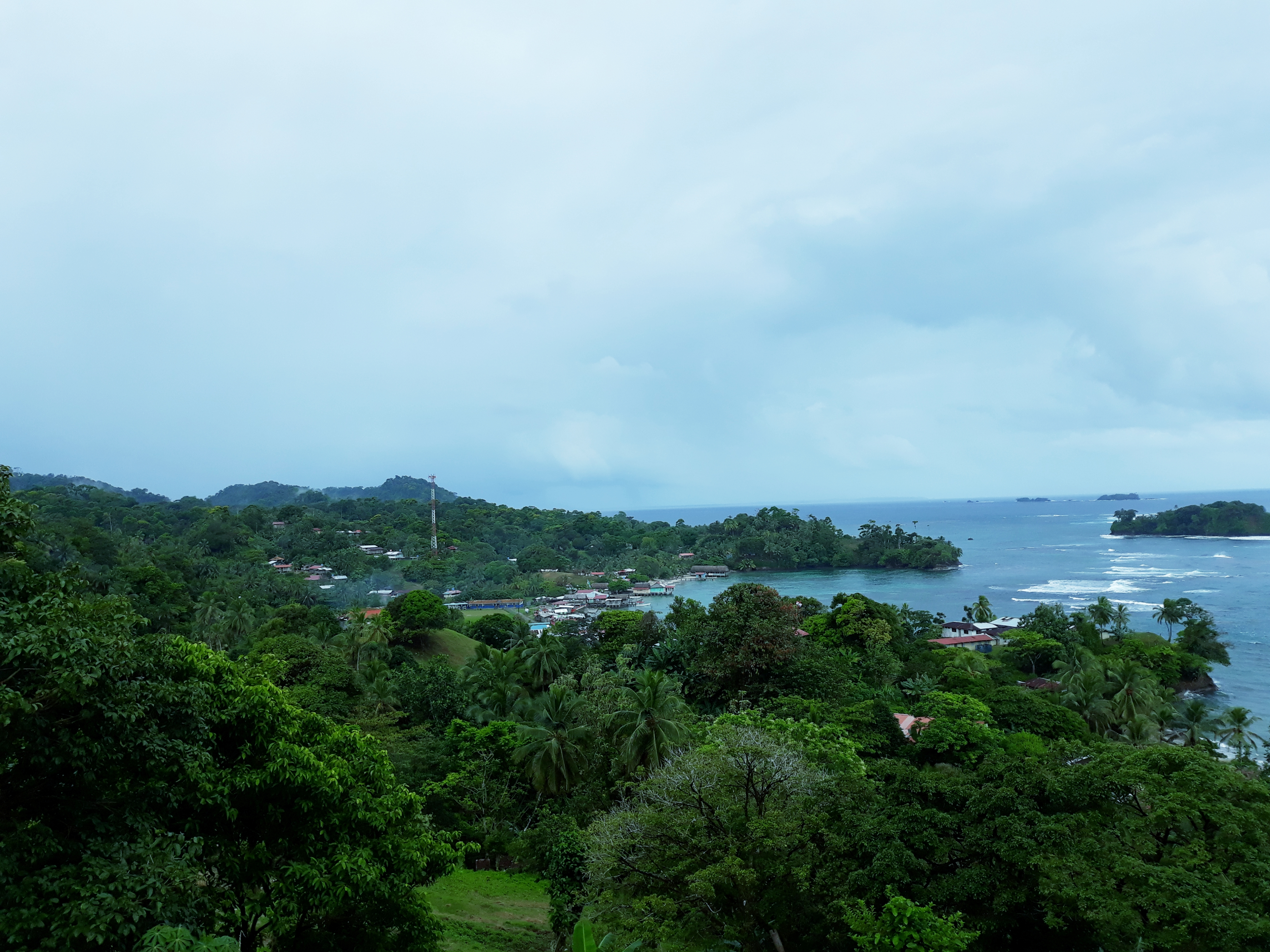 Vista Panoramica de Kusapin